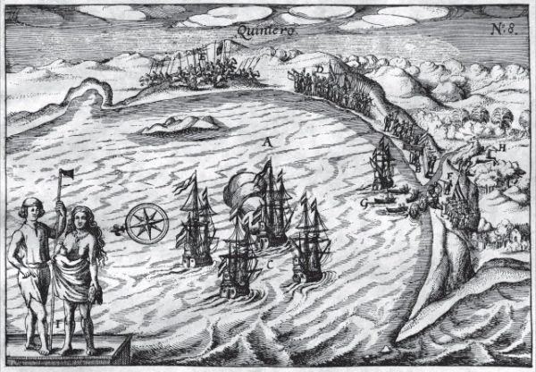 Bahía de Quintero Van Spielbergen